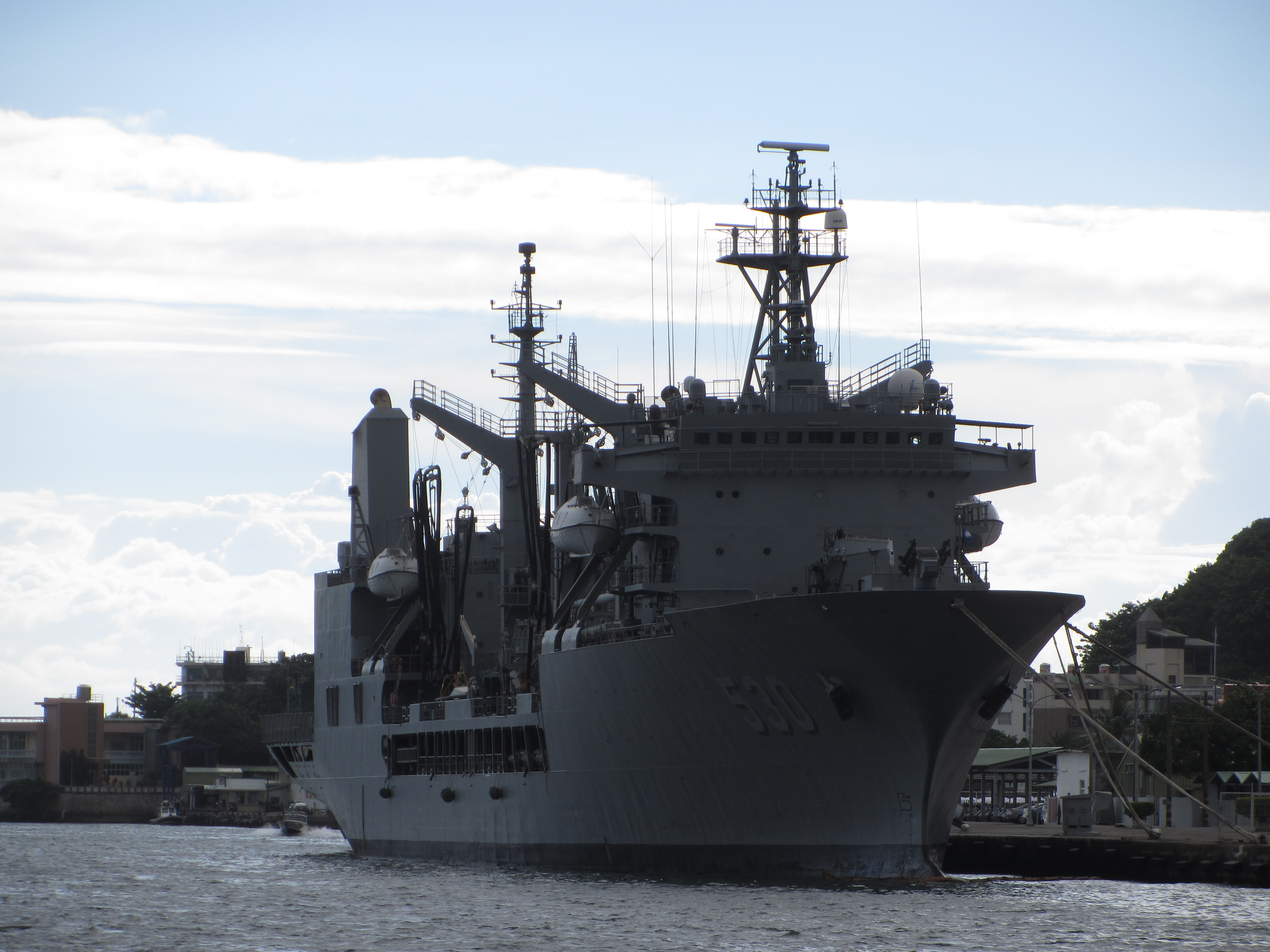 中華民國海軍武夷軍艦(AOE-530)停泊高雄港。